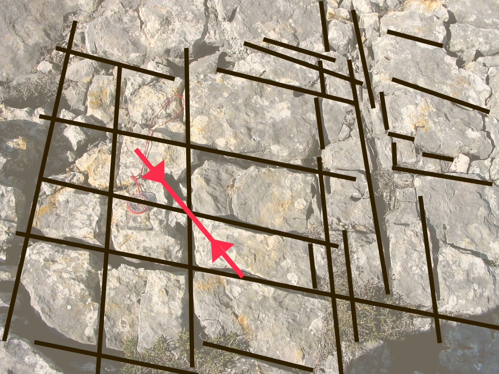 Esquema de dos familias de diaclasas conjugadas. Ver [Archivo:Diaclasas_en_dolomías_Cuenca.jpg]. La línea roja indica el sentido de la compresión.